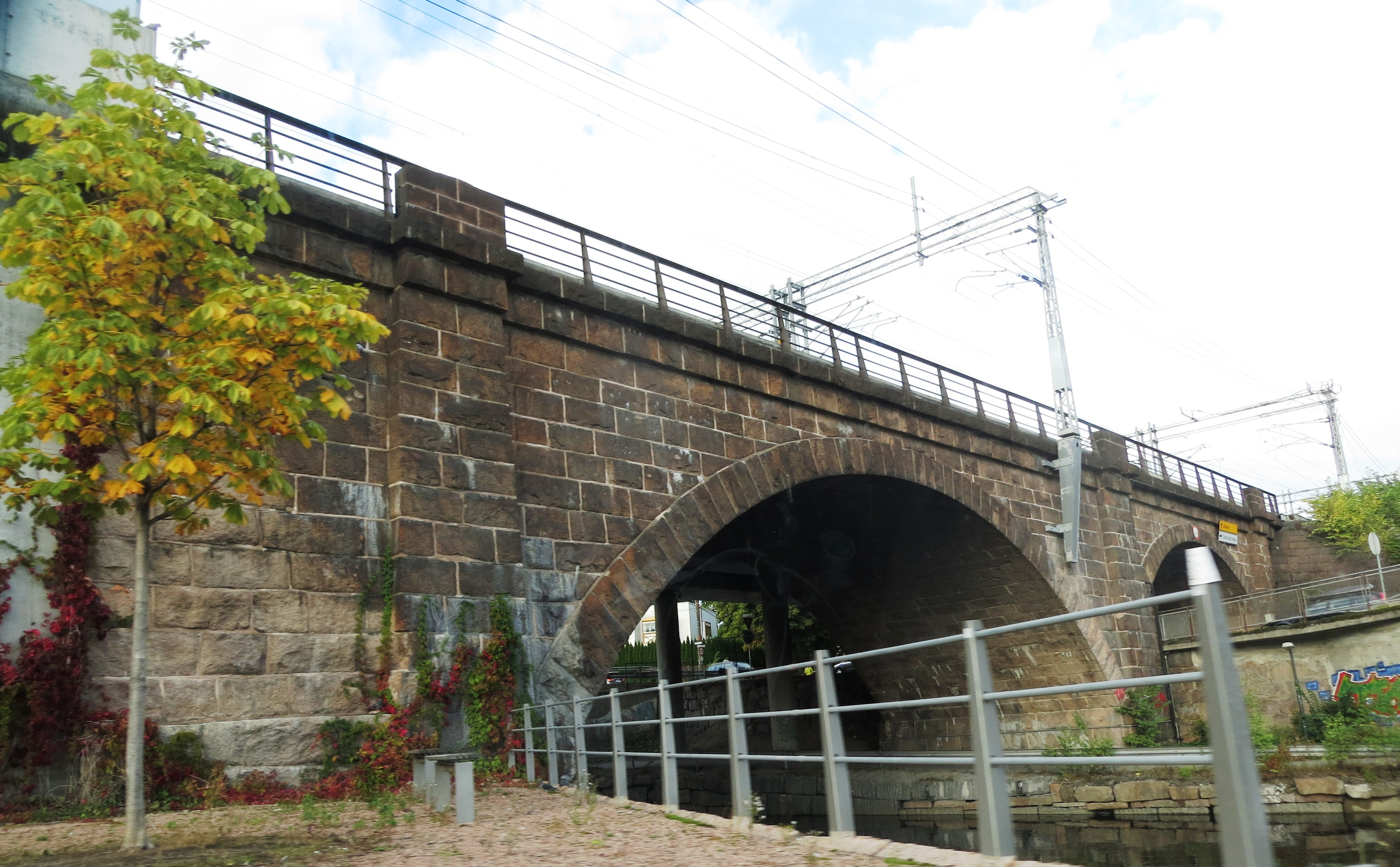 Lysaker Bru for jernbanen mellom Oslo og Bærum.